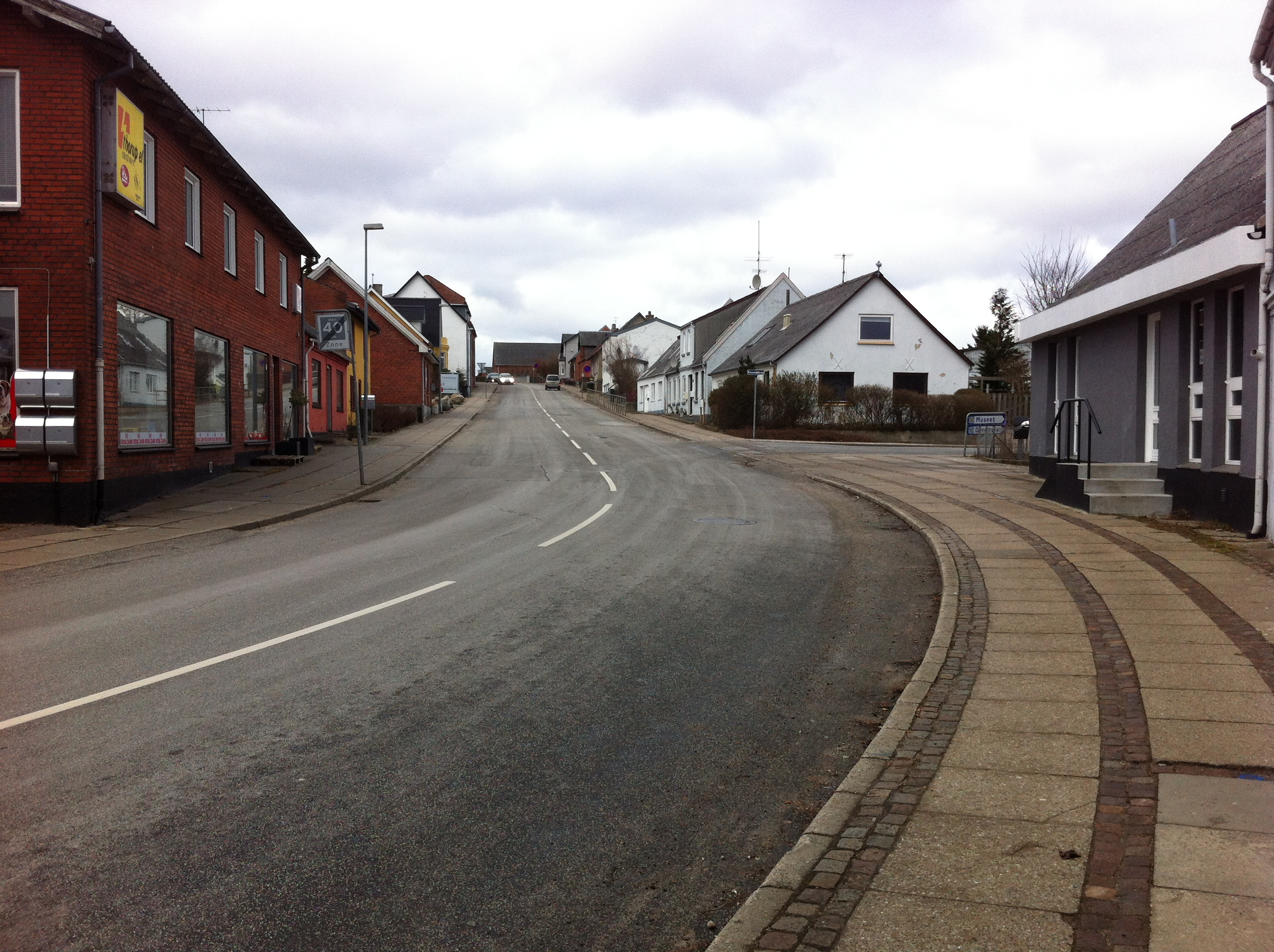 Nørregade 9560 Hadsund set mod nord